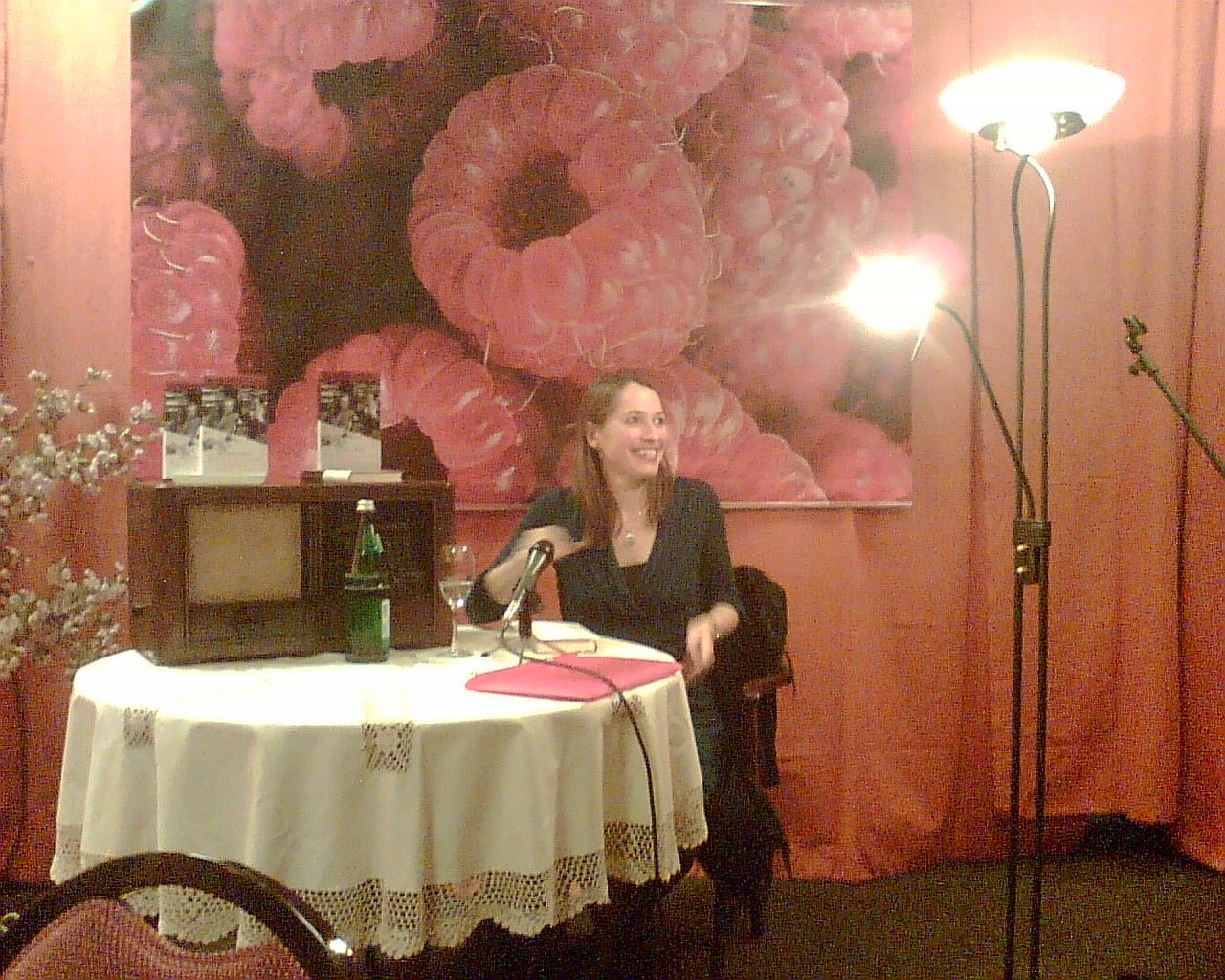 W. Eden bei Lesung in Nordhorn am 09.10.2008